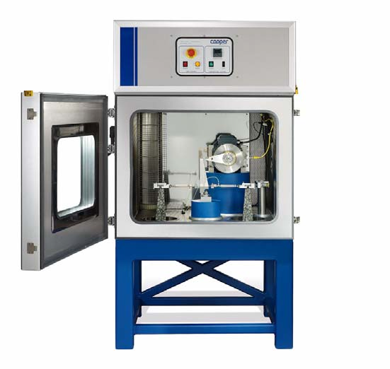 vybavenie Katedry technológie a manažmentu stavieb - zariadenie na dvojbodový ohyb